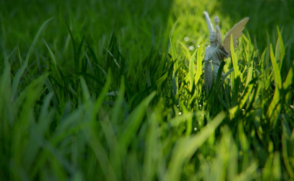 Angel en grass. Render en 3ds max con vray. Usando ornatrix, multiscatter. La escultura del angel es modelo descargado de internet.